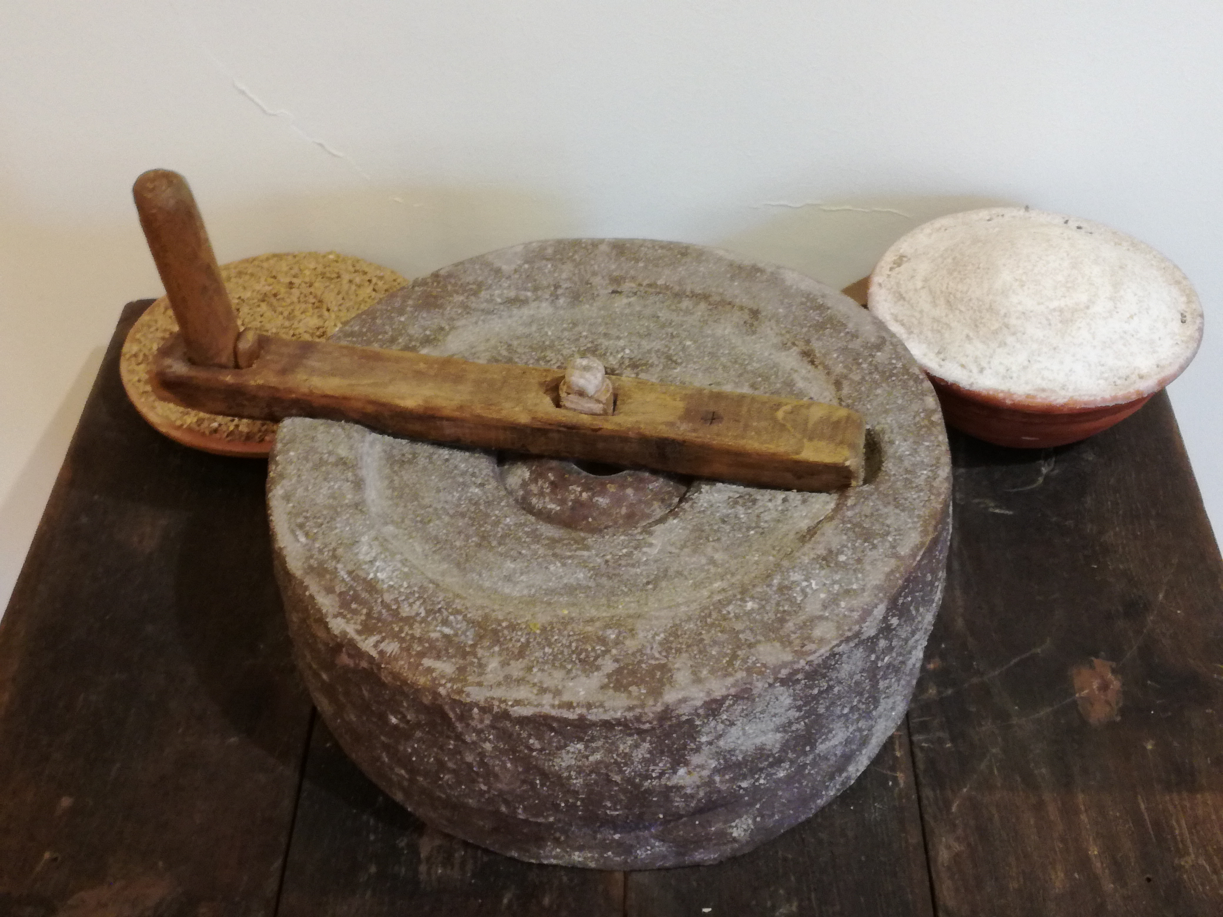 Utensili per la macinazione